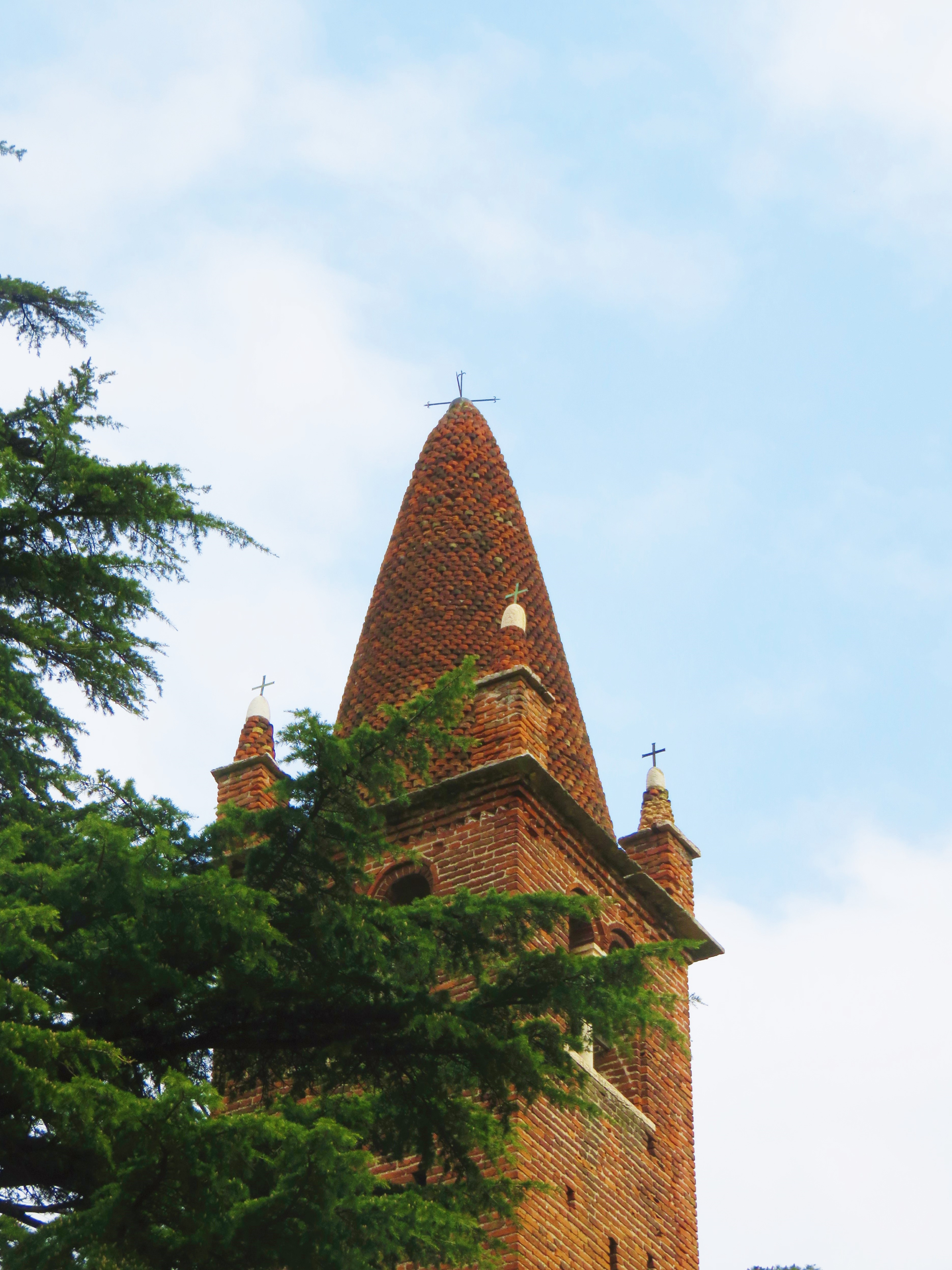 Chiesa di San Pietro in Bosco. Campanile.